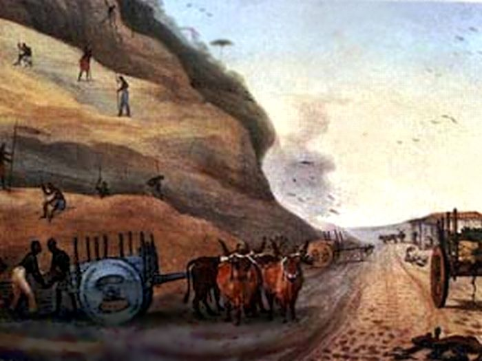 Pedreira